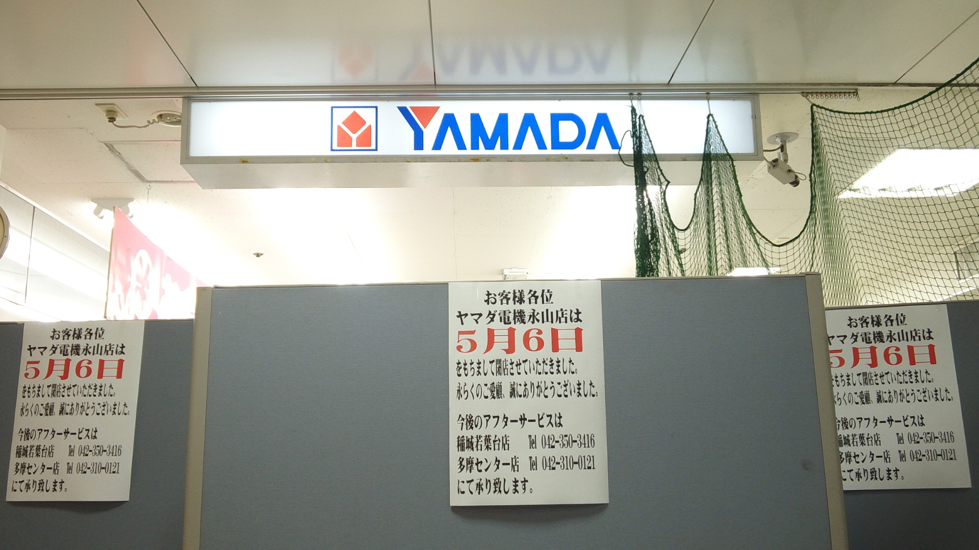 2015年の大量閉店で閉店となったヤマダ電機テックランド永山店